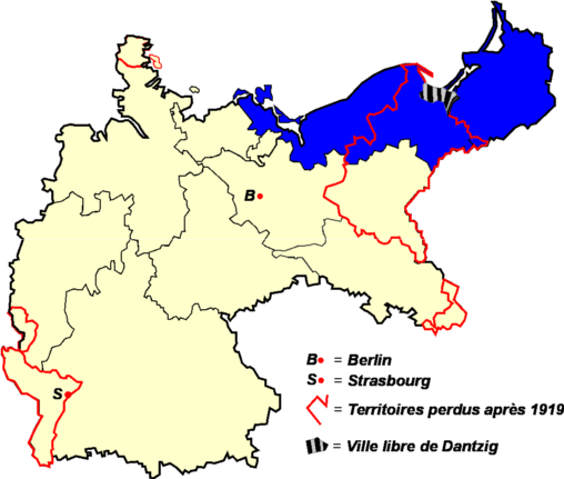 Territoires couverts par la Fédération de football d'Allemagne du Nord-Est (BSV) de 1904 à 1933 Catégorie:Logo Fédérations Allemandes de Football